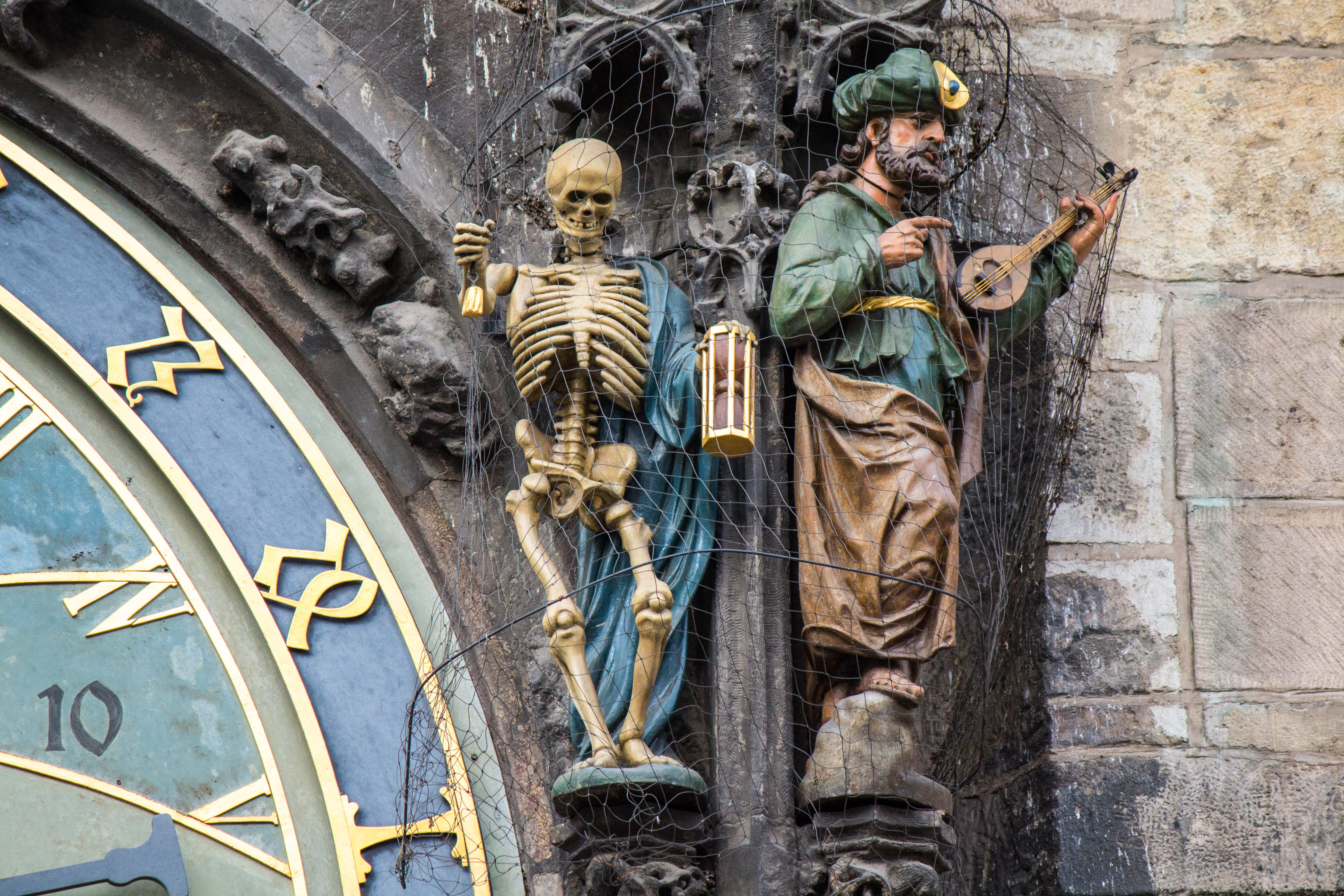 Der Tod und die Wollust